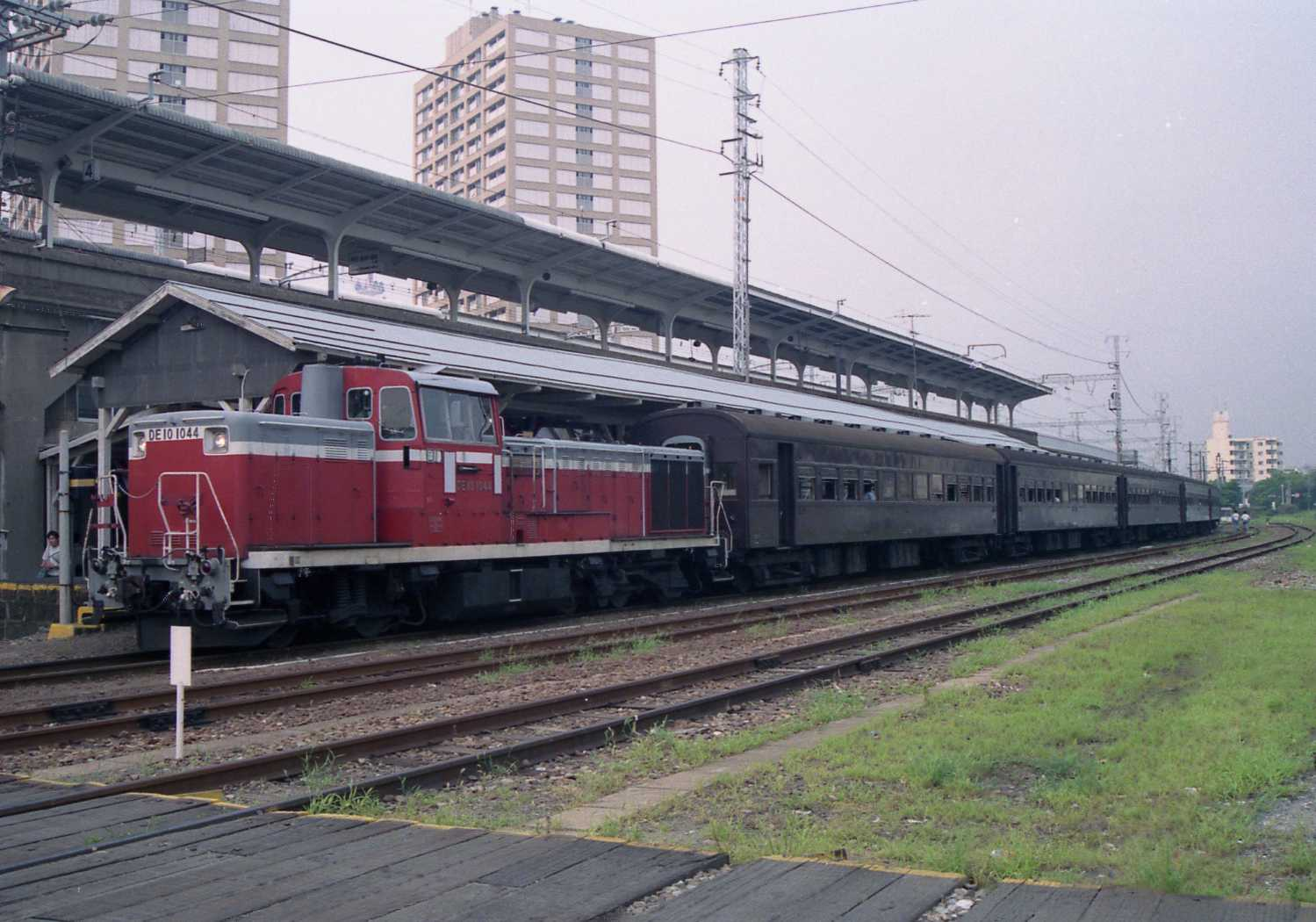 JR西日本和田岬線の客車列車。1993年頃。投稿者（Kone）が兵庫駅で撮影。機関車はDE10形、客車はオハフ64形、オハ64形